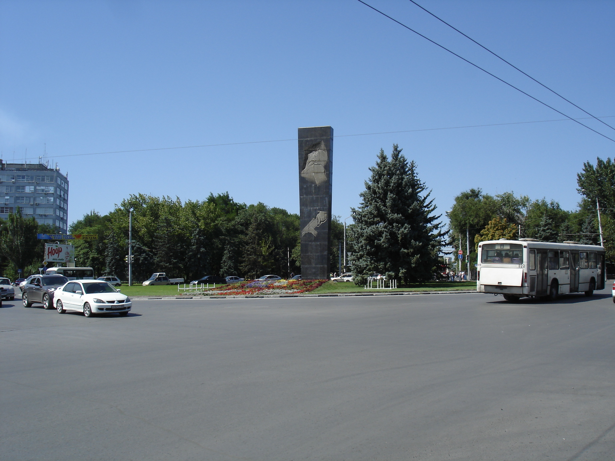 Комсомольская площадь Ростова-на-Дону